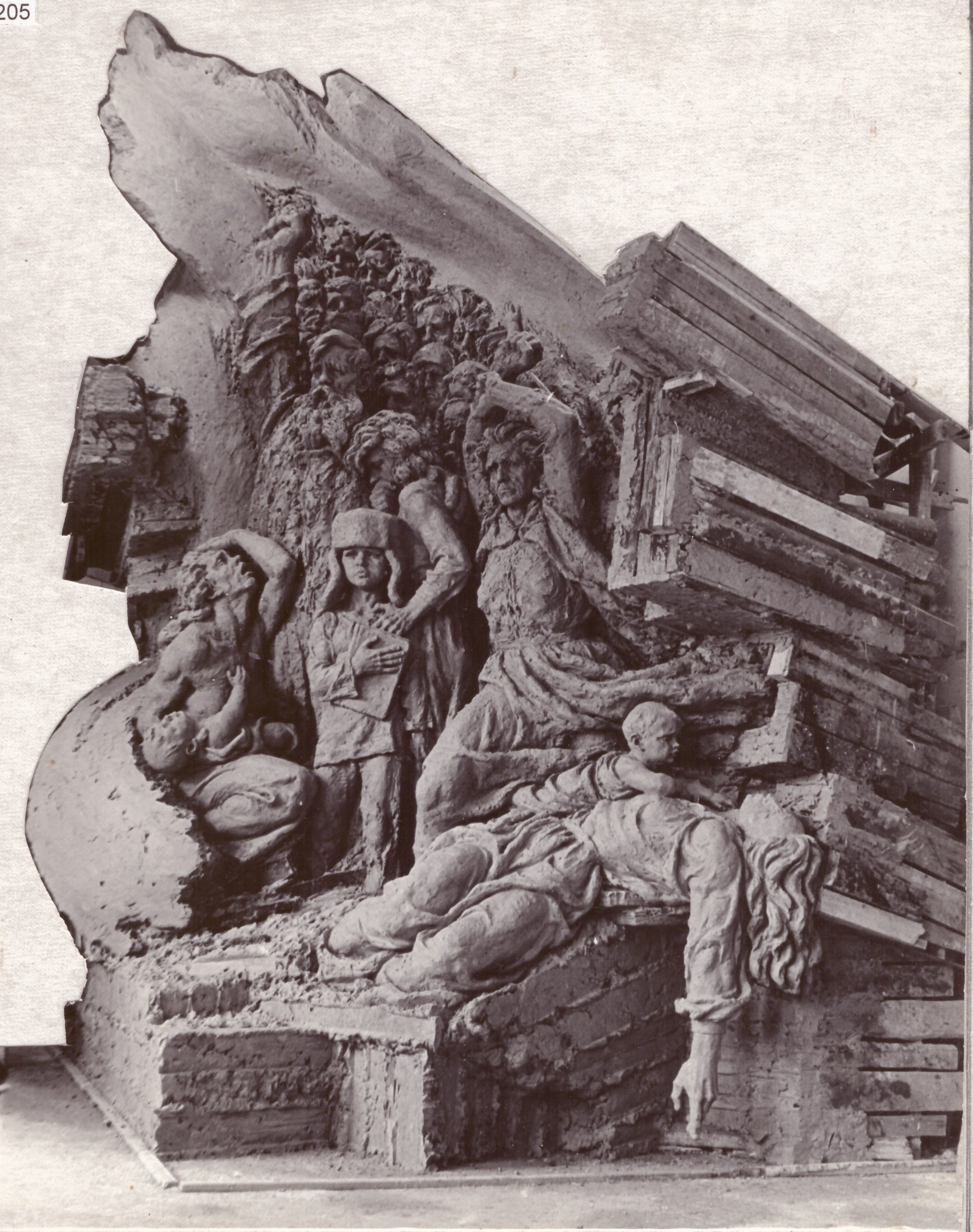 Пам’ятник селу Хочине Олевського району Житомирської області, спаленому в роки Великої Вітчизняної війни німецько-фашистськими загарбниками. 1984. Скульптор Таранченко В.О., архітектор Бірюк П.М. Горельєф. Литий бетон. 600 х 550 х 420.